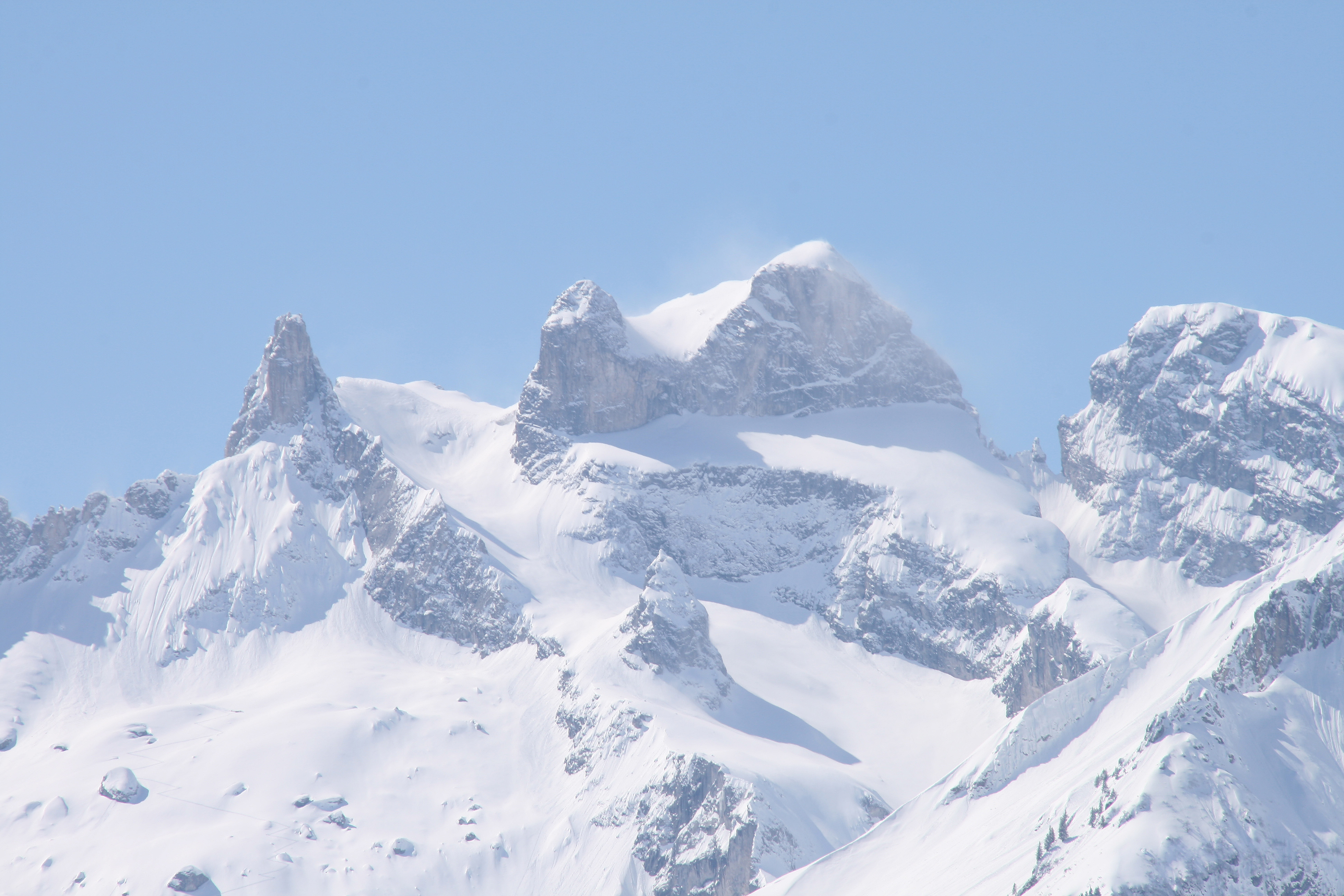 Blick vom Bergpanoramastandort neben der Kirche in Bartholomäberg auf die gegenüberliegenden Berge des Rätikon. Hier die Drei Türme mit 2827m Rechts im Bild sieht man sehr gut das Eisjöchle mit 2638m , das den Hauptgrat zur Drusenfluh mit 2827m unterbricht..